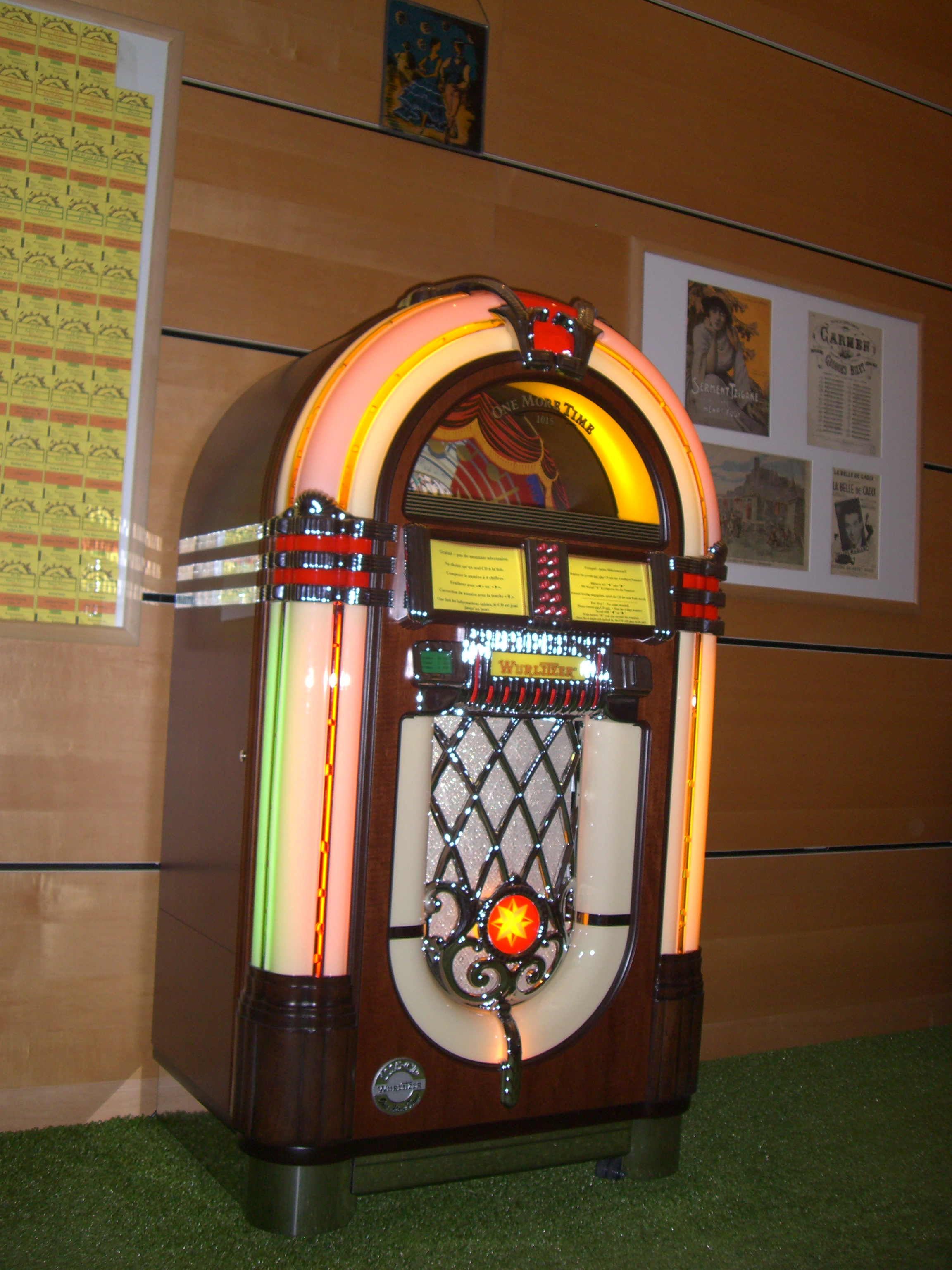 Jukebox